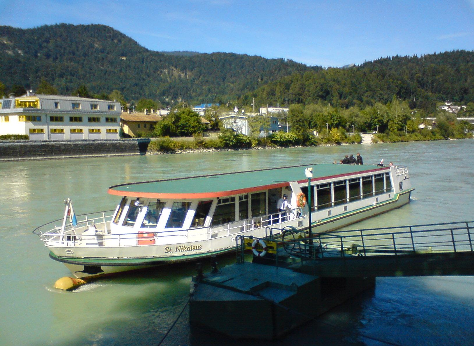 Kufstein, Innschiff St. Nikolaus nächst der Anlegestelle am Fischergries, linkes Innufer, Schiff mit dem Bug flussaufwärts orientiert (St. Nikolaus war nur etwa 1997 bis längstens 2014 hier)